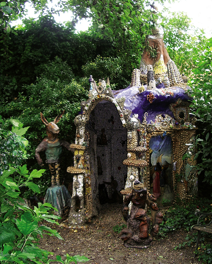 Grotte réalisée par JM Chesné dans son jardin à Malakoff dans les Hauts de Seine près de Paris